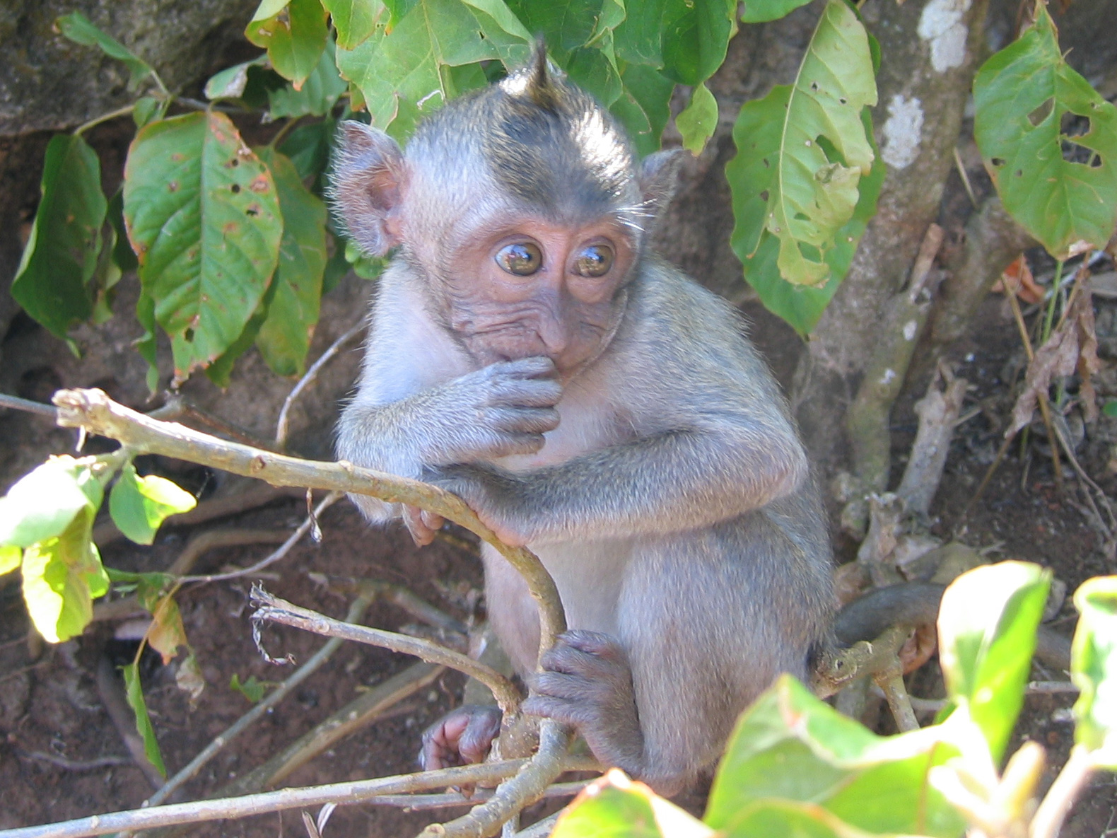 Juvenile Macaque photographed in Nusa Penida, Bali, Indonesia